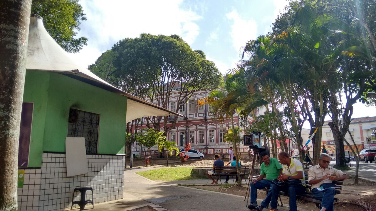 Praça J. J. Seabra, na foto é possível ver os fotógrafos conhecidos na região como "lambe-lambe" e o Palácio Marquês do Paranaguá.